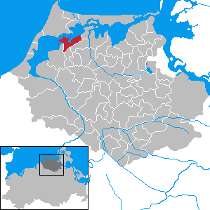 Fuhlendorf in Mecklenburg-Vorpommern - District Nordvorpommern